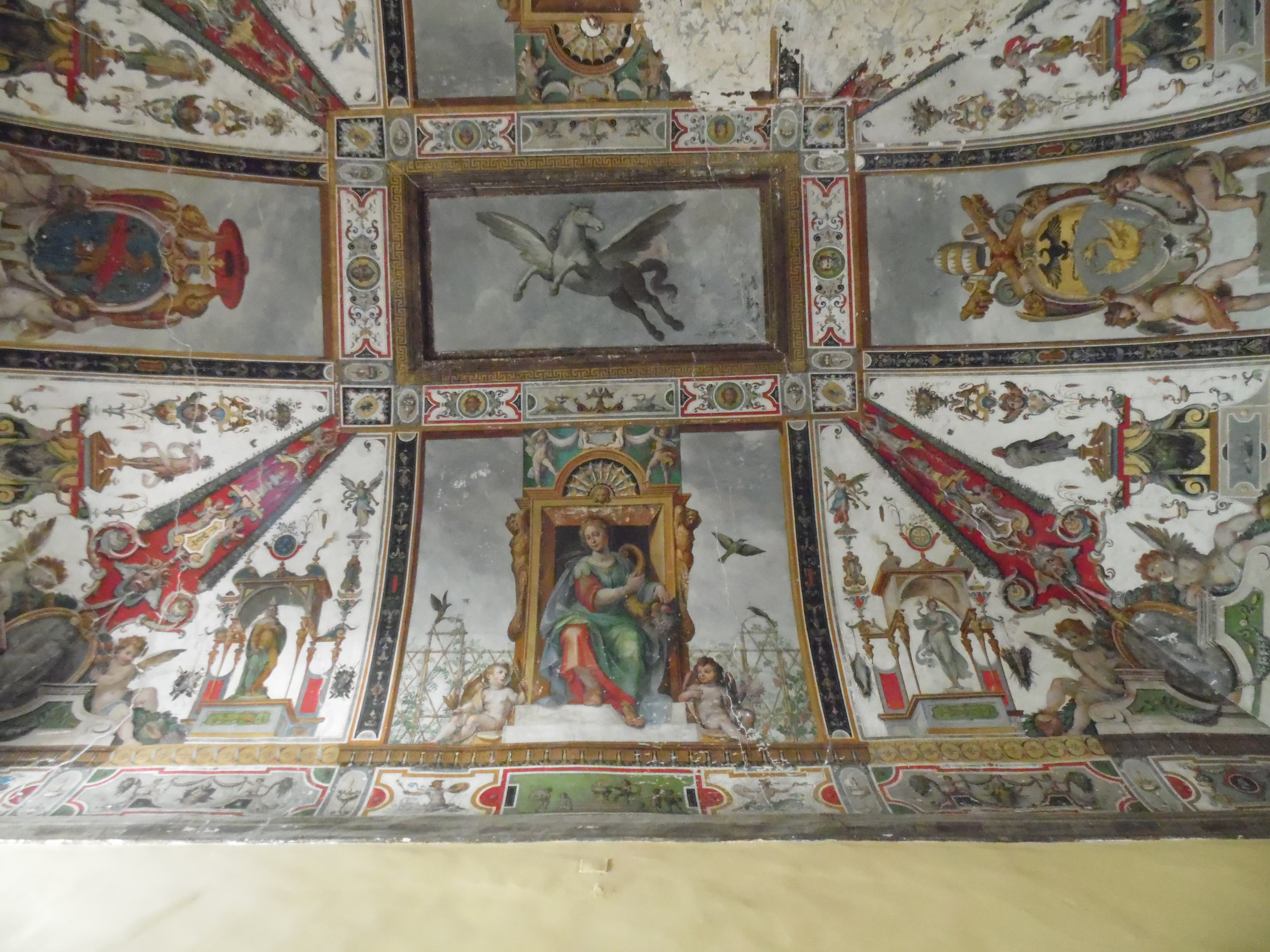 Die ländliche Villa Grazioli ist eine denkmalgeschützte Villa mit Garten in dem Ort Grottaferrata, Region Latium nahe Rom in Italien. Sie ist ein Bauwerk der Renaissance und wurde um 1580 von Kardinal Antonio Carafa errichtet.